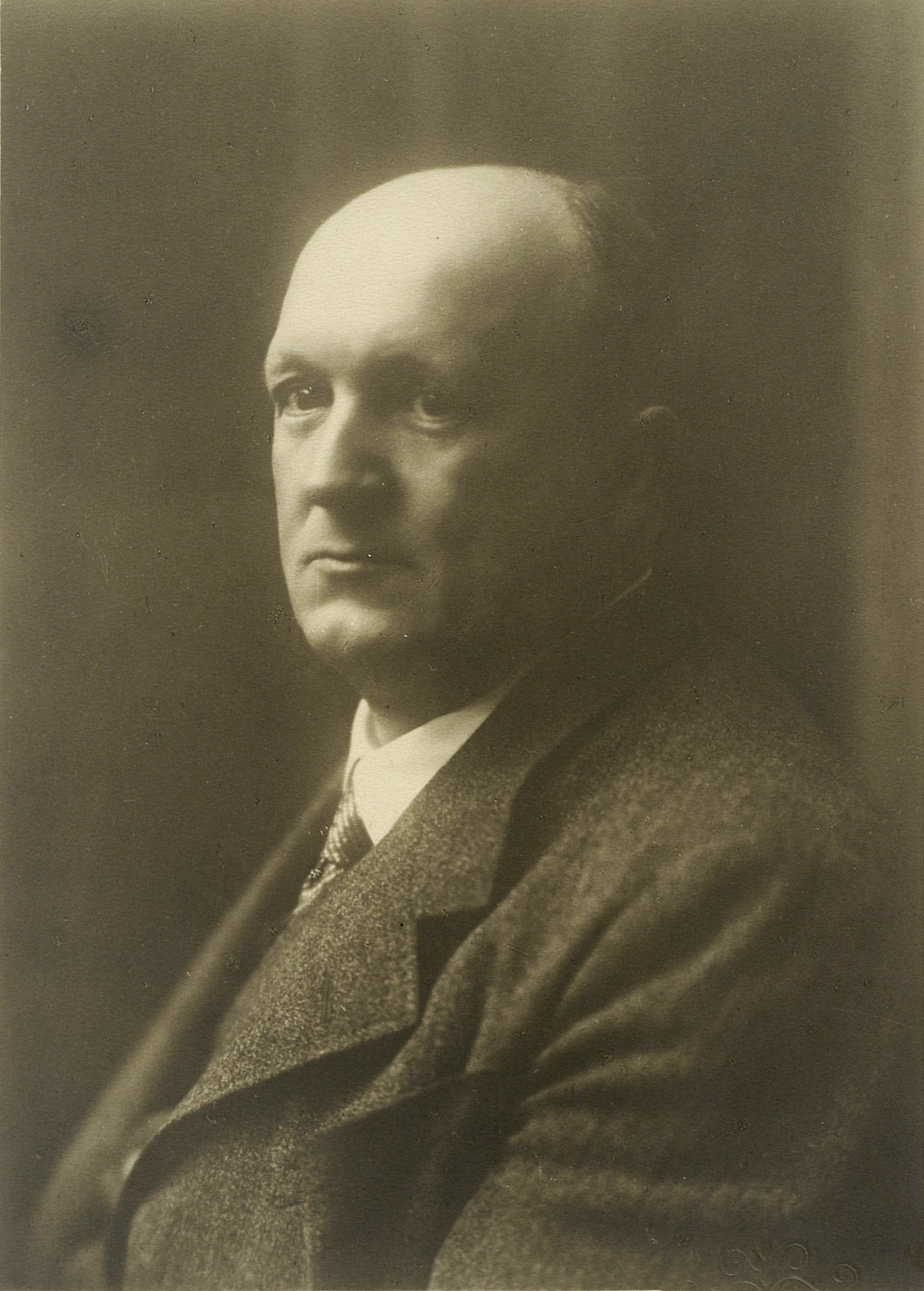 portret